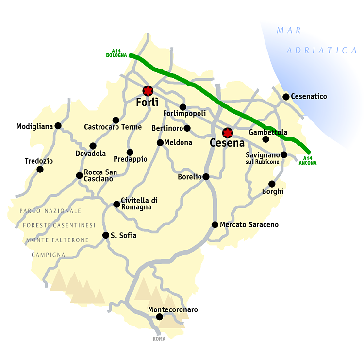 Kaart van de provincie Forlì-Cesena